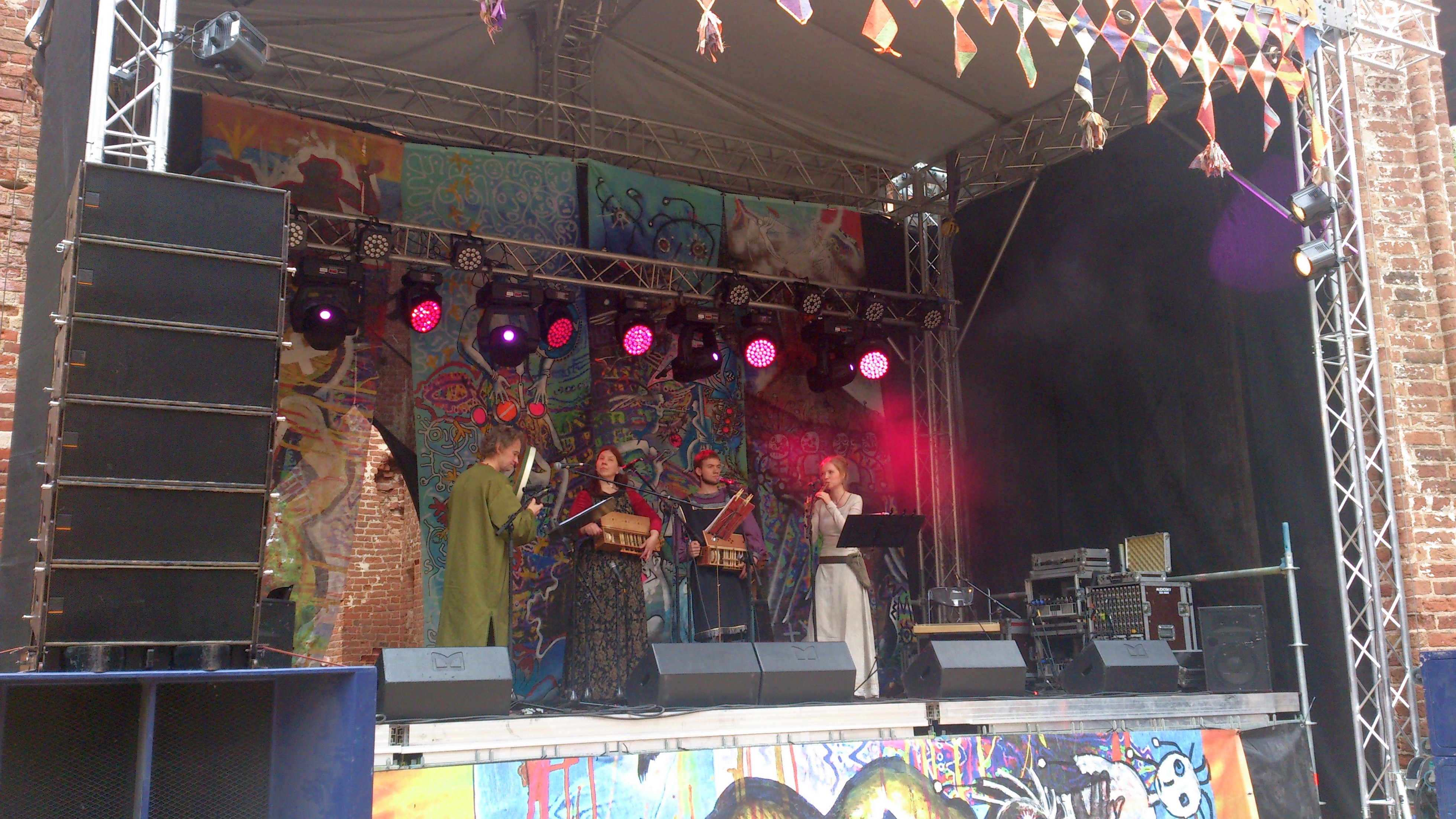 Rondellus Tartu hansapäevadel 2014